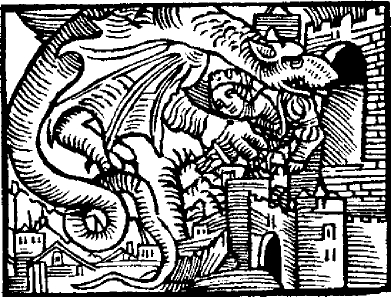 Enlèvement de Kriemhild par un dragon, d'après une édition du Siegfried à la peau de corne, XVIe ou XVIIe siècle.